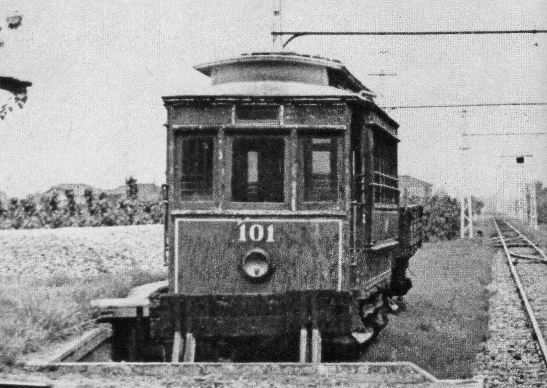 美濃電101号。（1939年廃車）